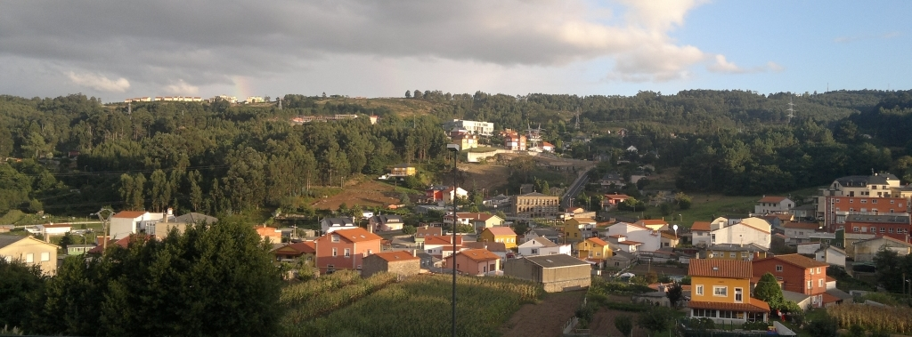 Feáns (Elviña, A Coruña, Galiza).